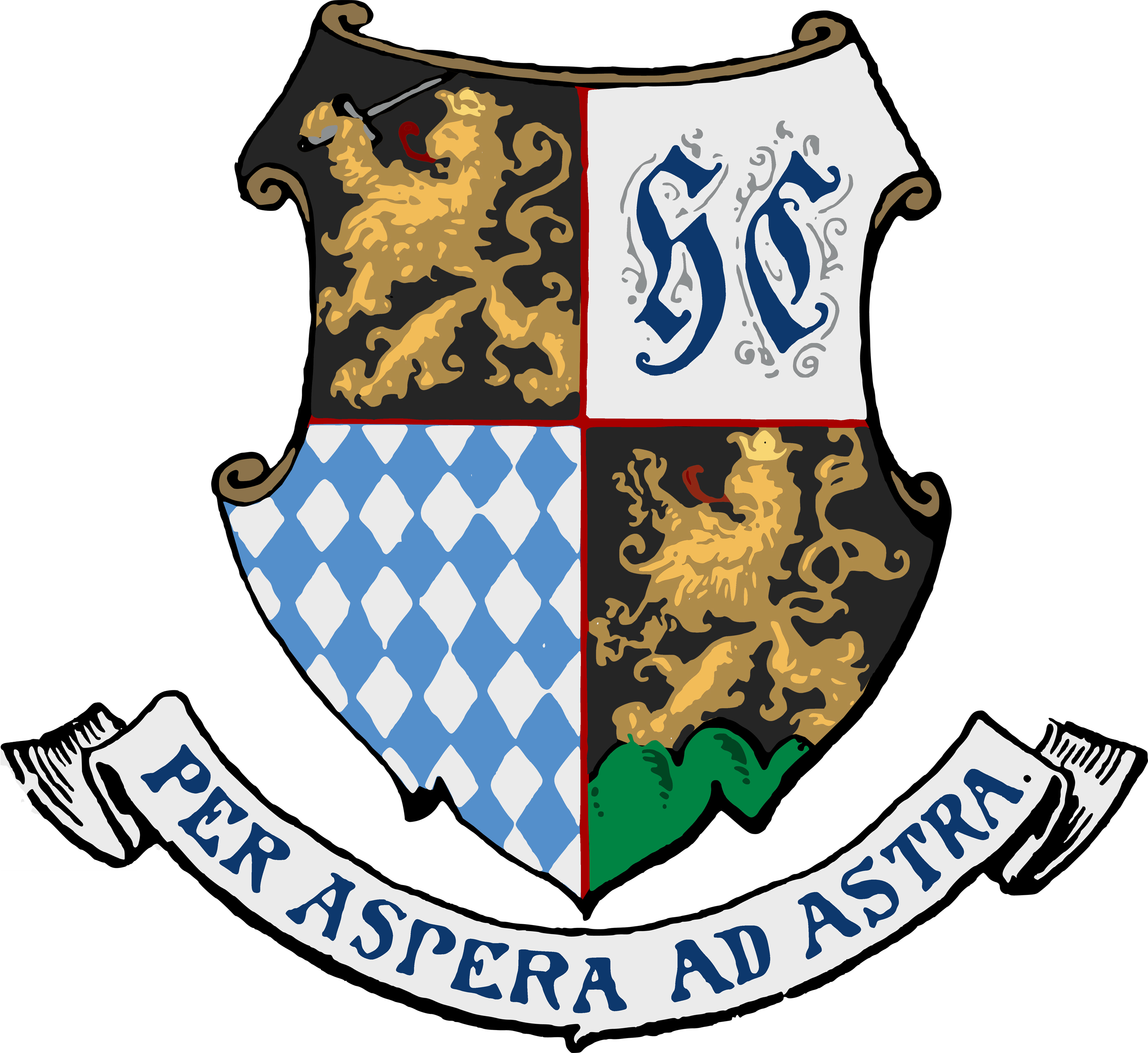 Wappen des Heidelberg College (Gründung 1. Januar 1887)